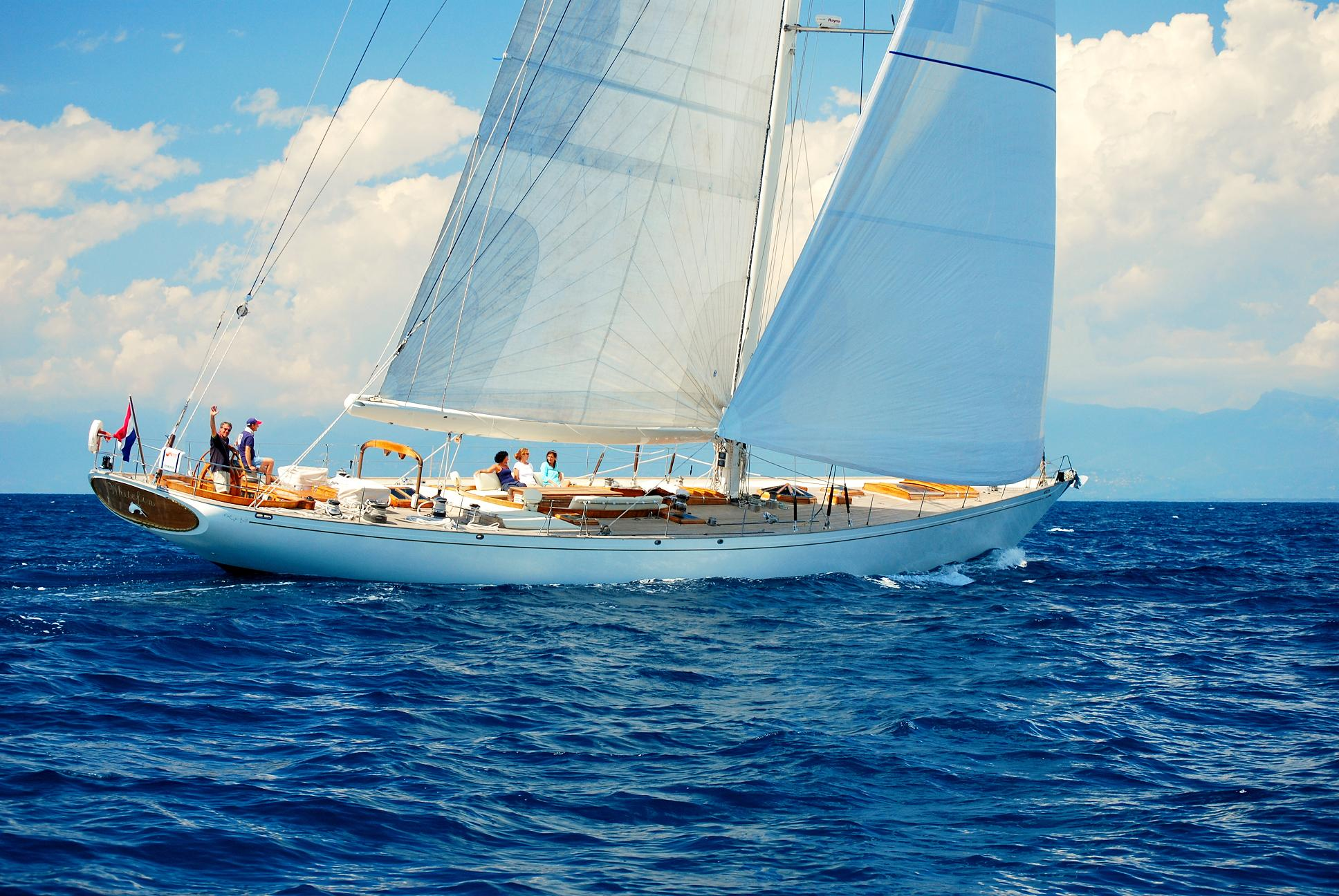 Whitefin rappresenta l'ideale di yacht (o barca) a vela nell'immaginario comune. Nonostante questa barca vanti lo stato dell'arte della tecnologia in campo di navigazione a vela, le sue linee classiche sono la naturale continuazione di una tradizione di tre secoli di architettura navale da diporto.